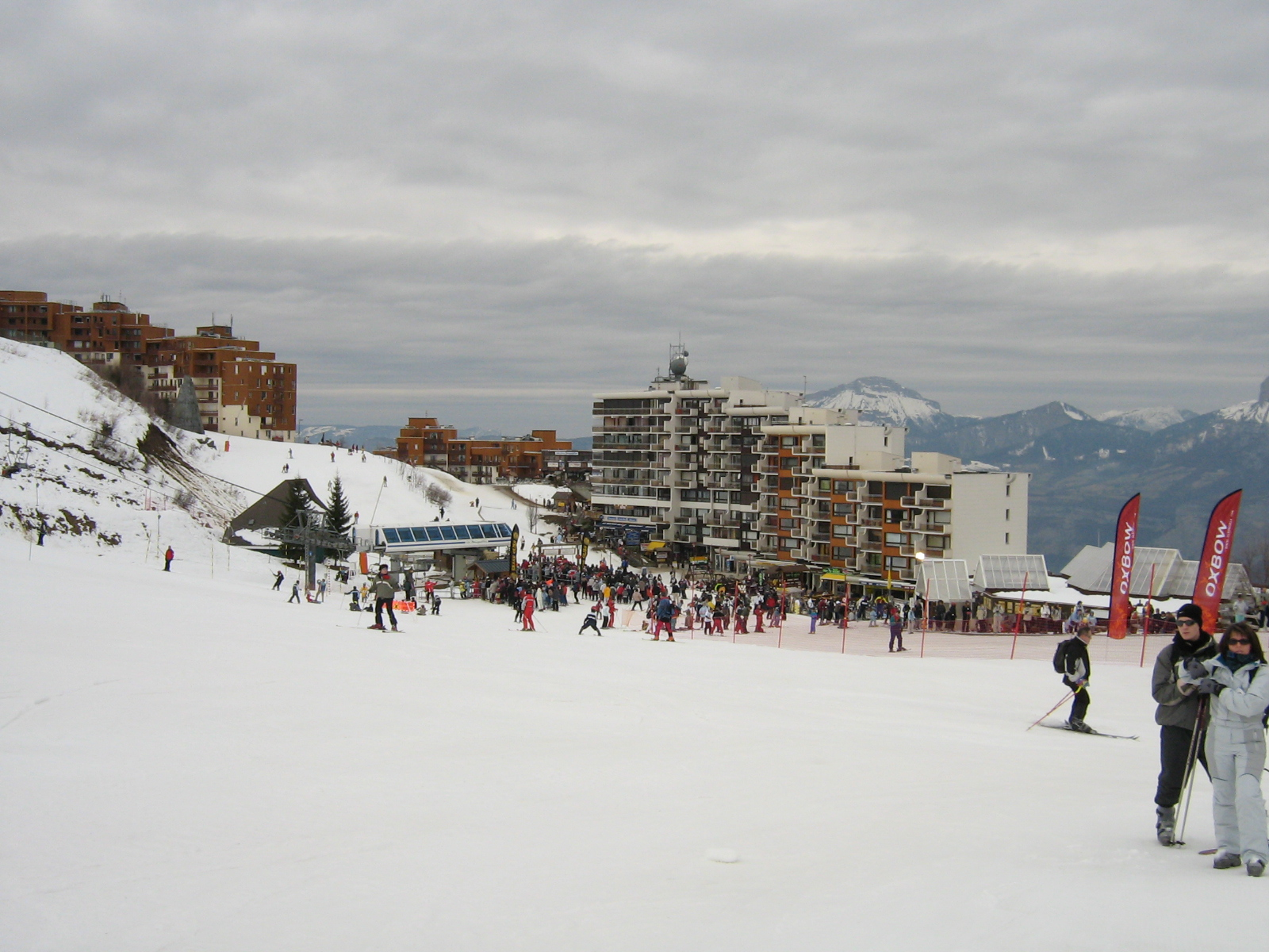 Secteur de Prapoutel aux 7 Laux.